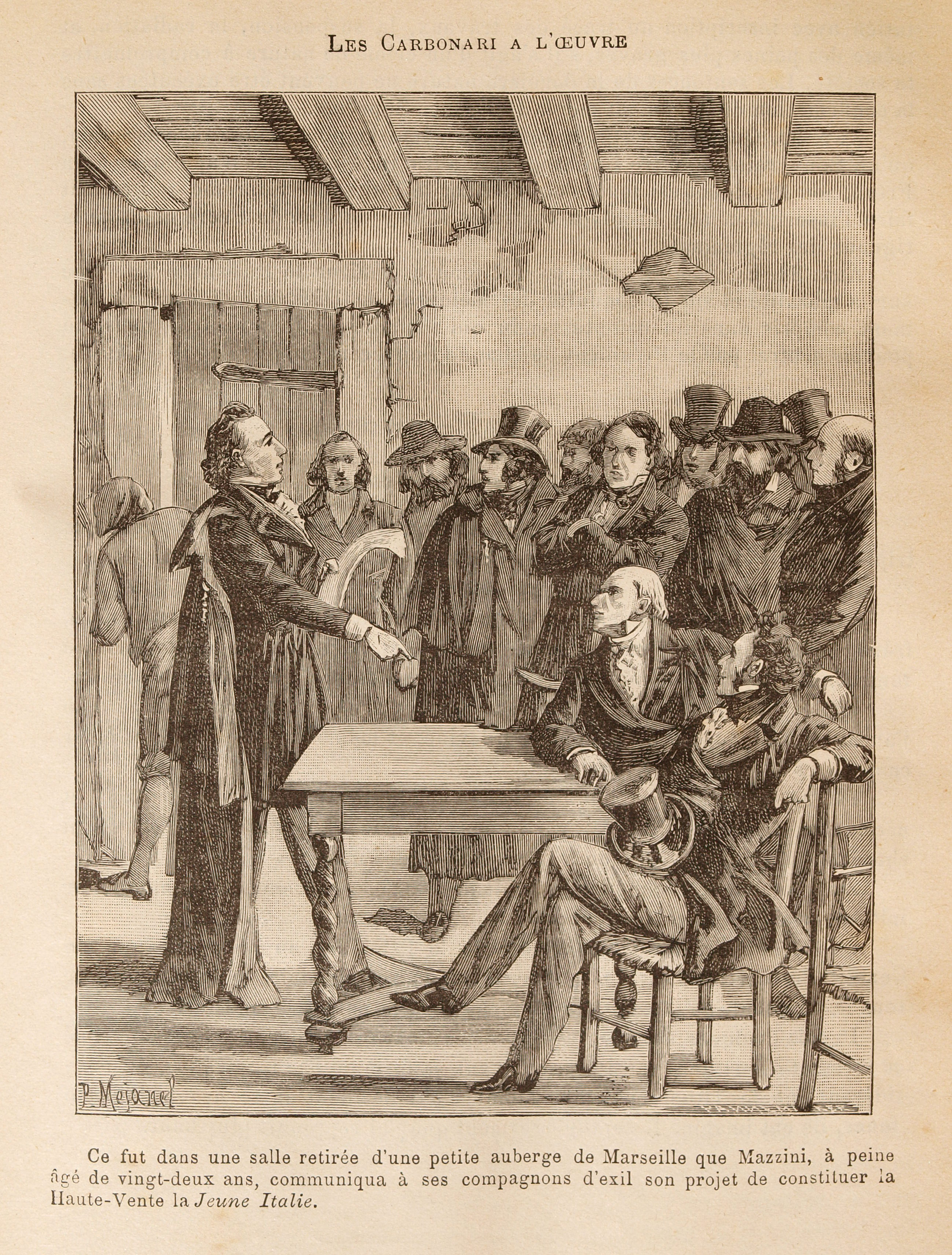 Une des gravures du document de Léo Taxil, Les Mystères de la Franc-Maçonnerie, Paris, 1886.